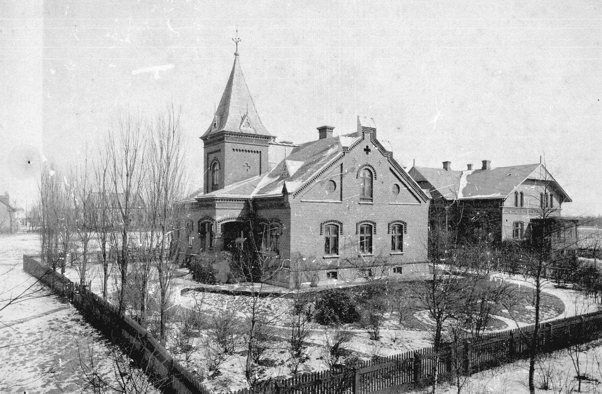 Villa Holma på Hyphoff 2/Finngatan 8. Foto mellan 1897 och 1902.